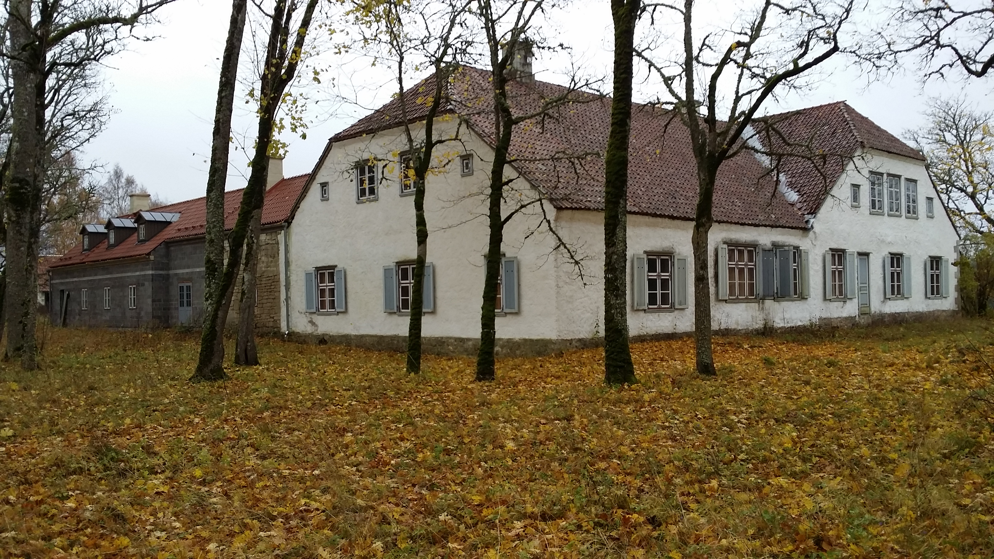 Pidula mõisa pargipoolne külg